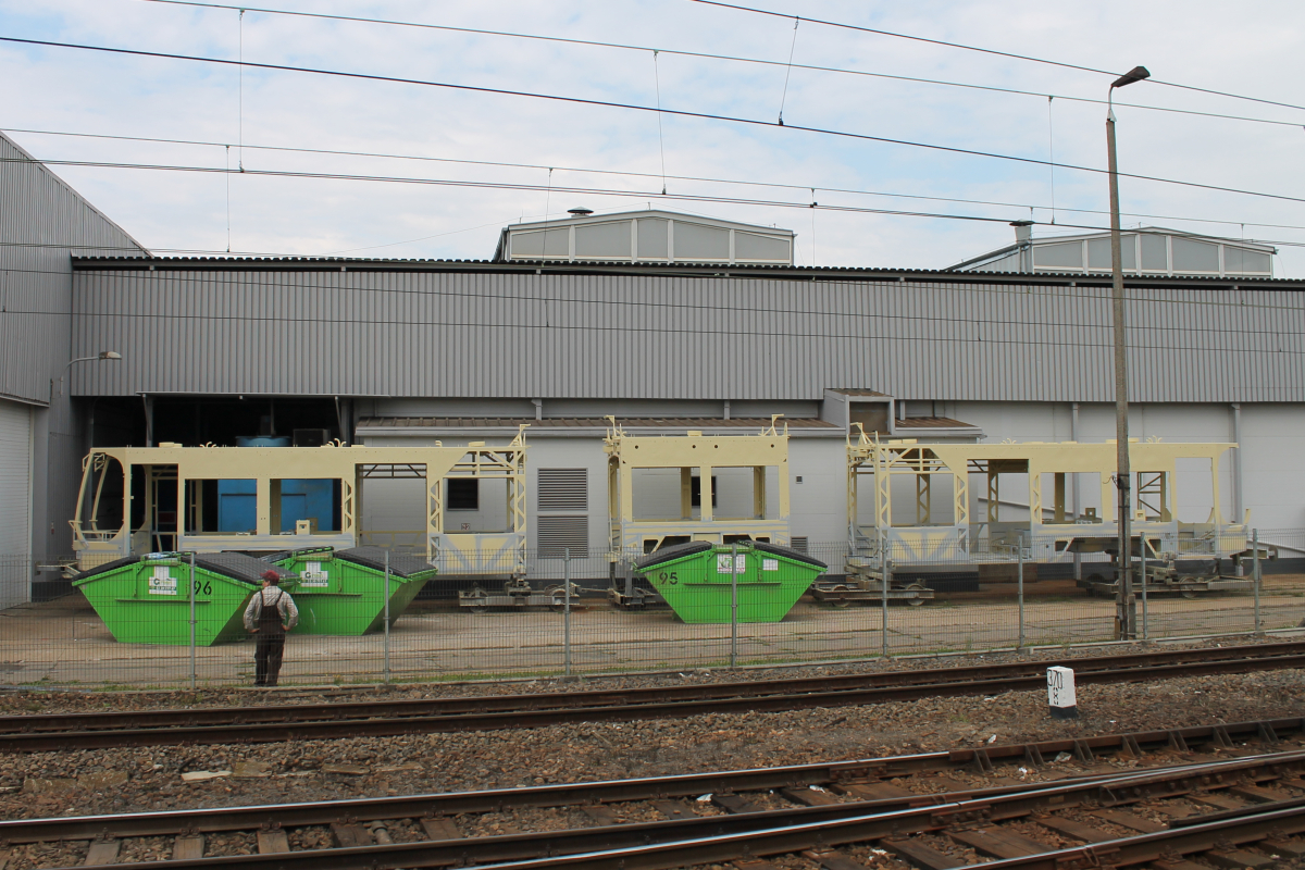 Pudła tramwaju Pesa Fokstrot dla Moskwy na terenie bocznicy zakładu Pesa Bydgoszcz. This photo was taken during Railway Wikiexpedition 2014 set up by Wikimedia Polska Association in cooperation with Fundacja Grupy PKP. You can see all photographs in category Wikiekspedycja kolejowa 2014.